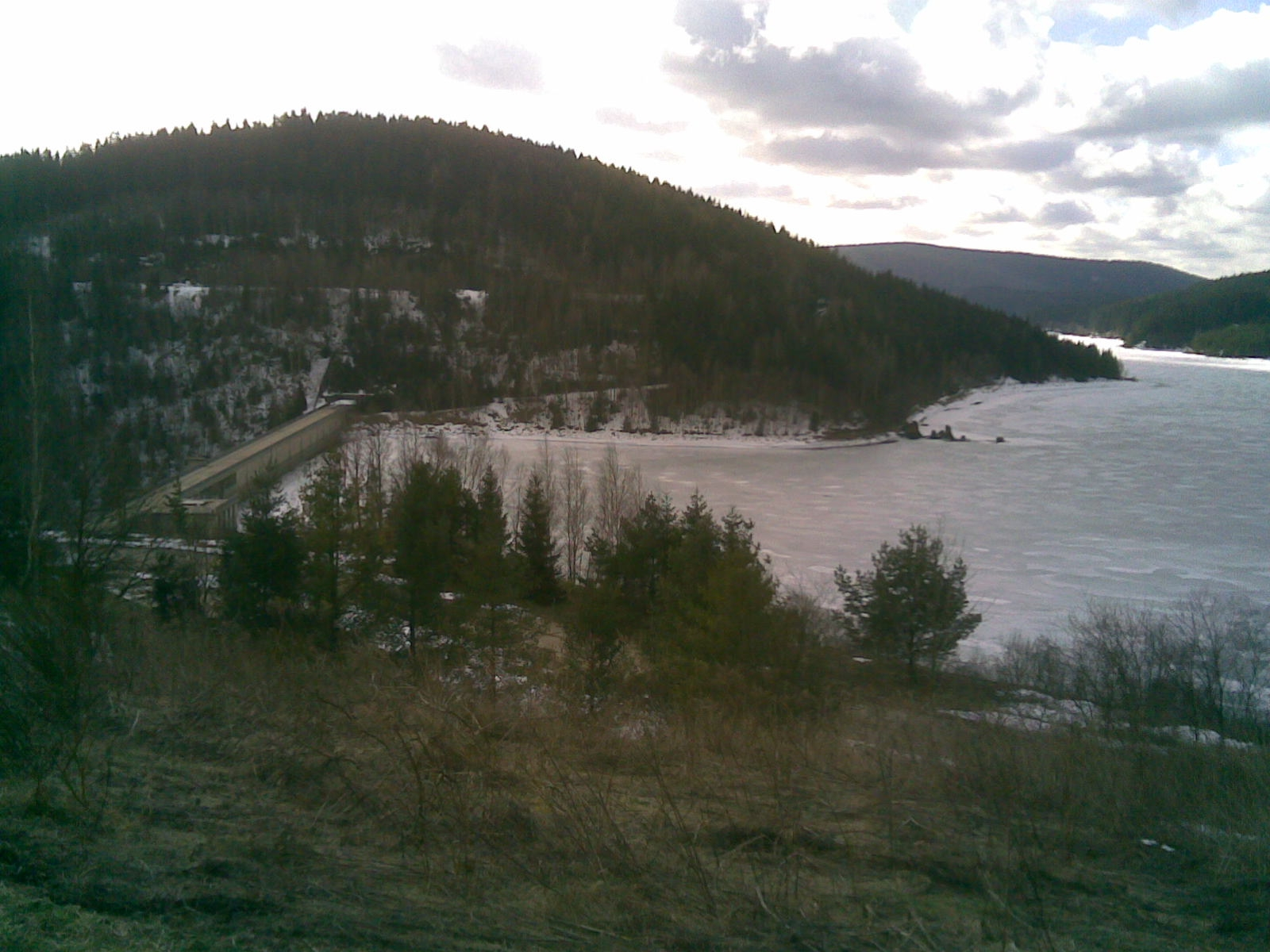 Talsperre Eibenstock, links die Staumauer